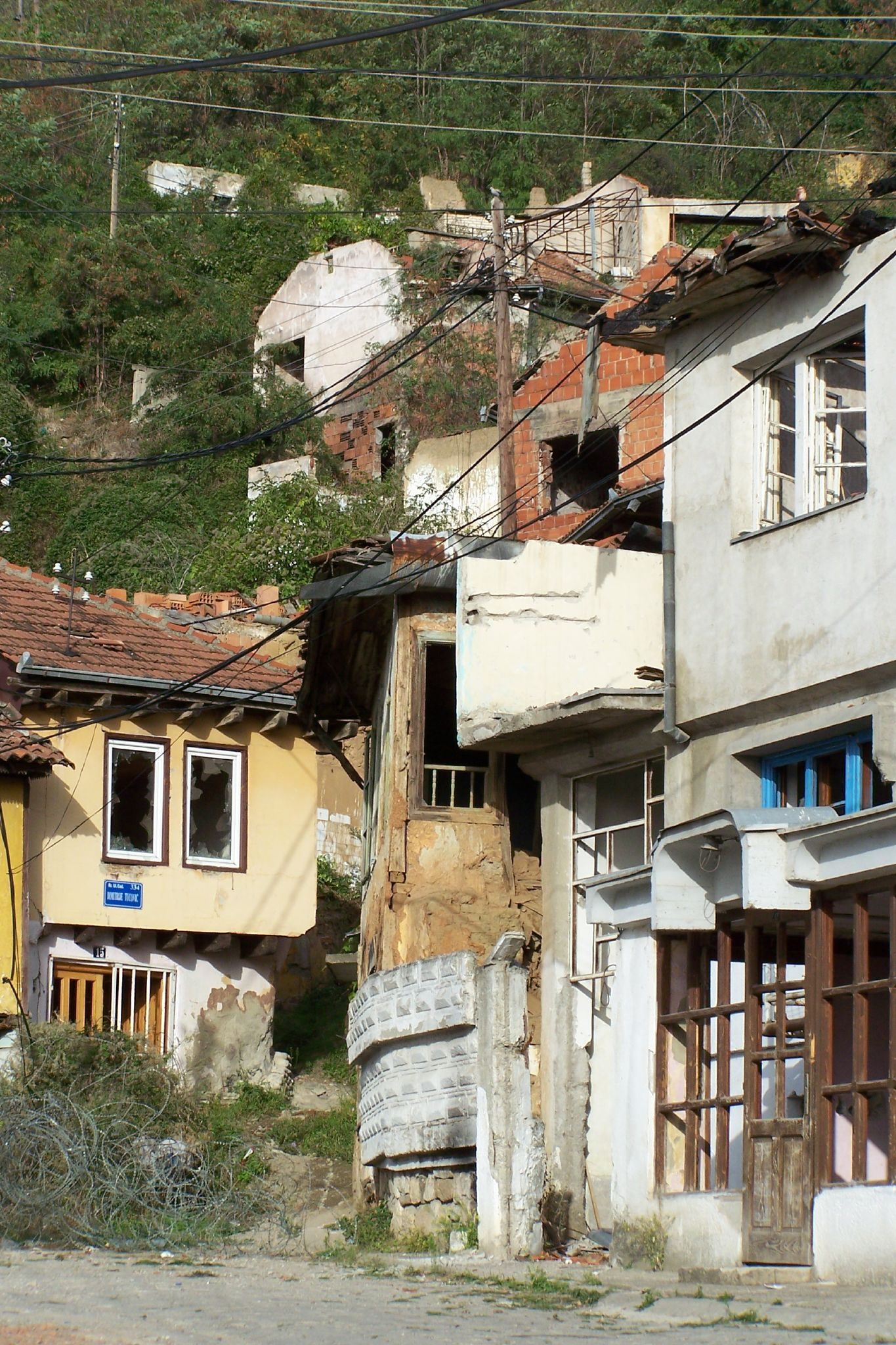 Destroyed Serbian houses in Prizren, Kosovo, Serbia